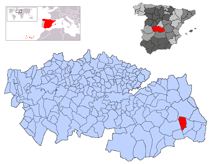 La Villa de Don Fadrique en la provincia de Toledo